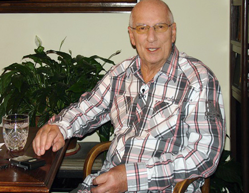 zpěvák Karel Štědrý